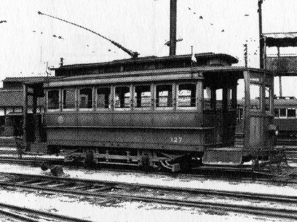 1940年ごろに撮影された広島瓦斯電軌（広島電鉄）の100(B)形電車127号。